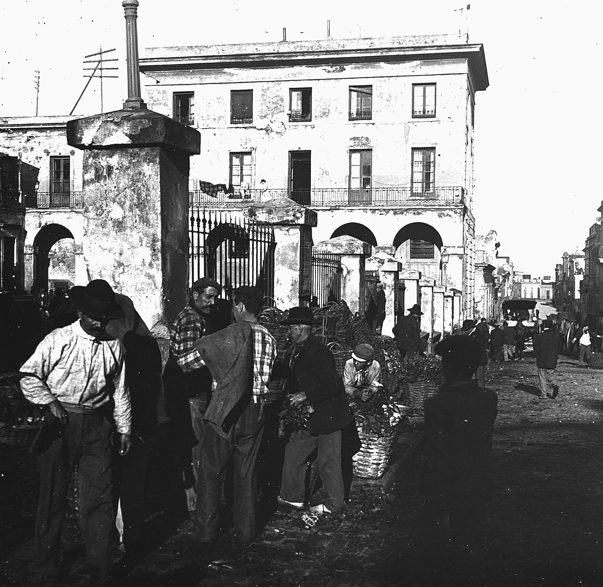 C09f089. Mercado Central. Calle Yerbal